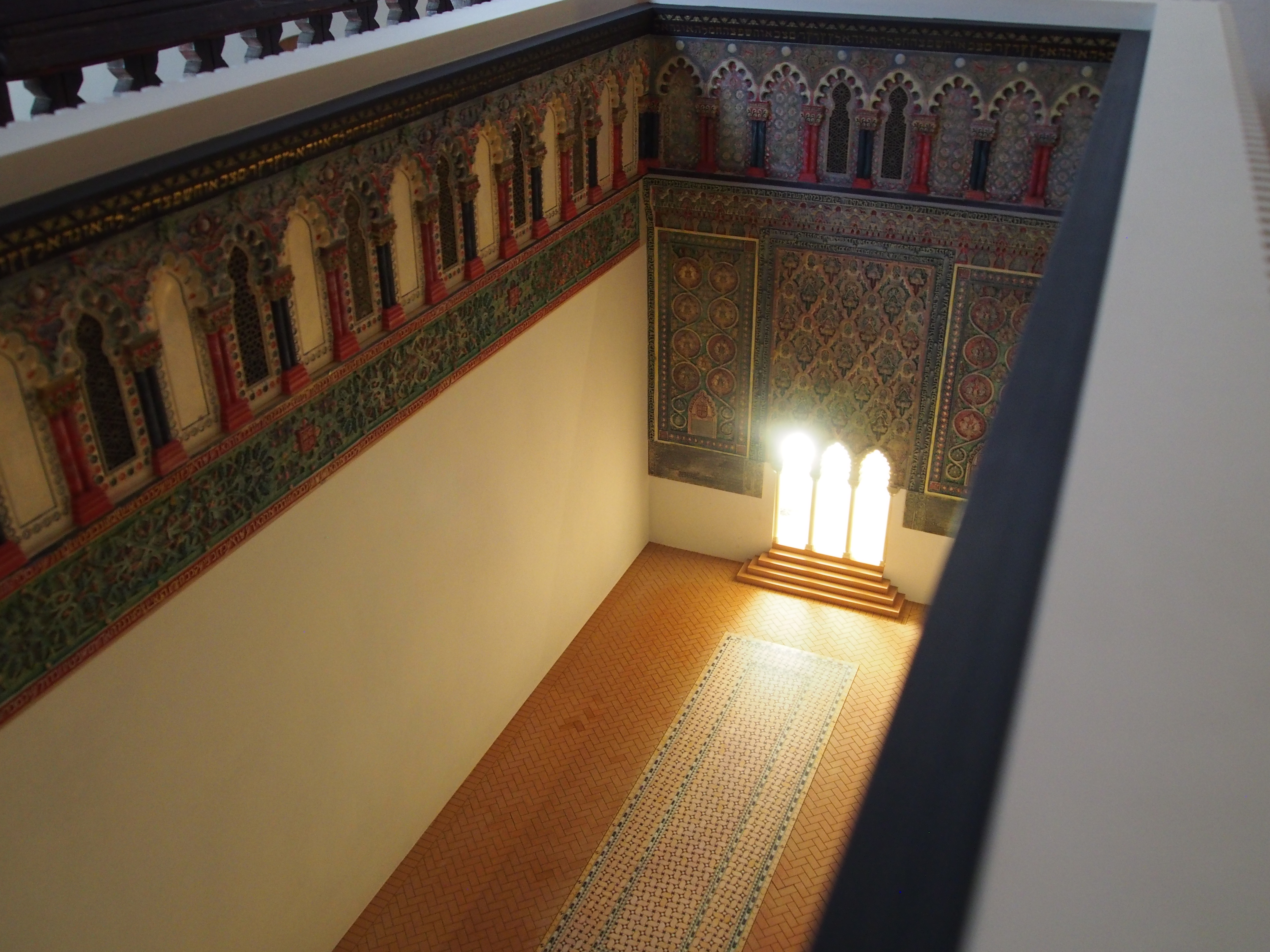 Maqueta que reconstrueix el color original de l'espai central.